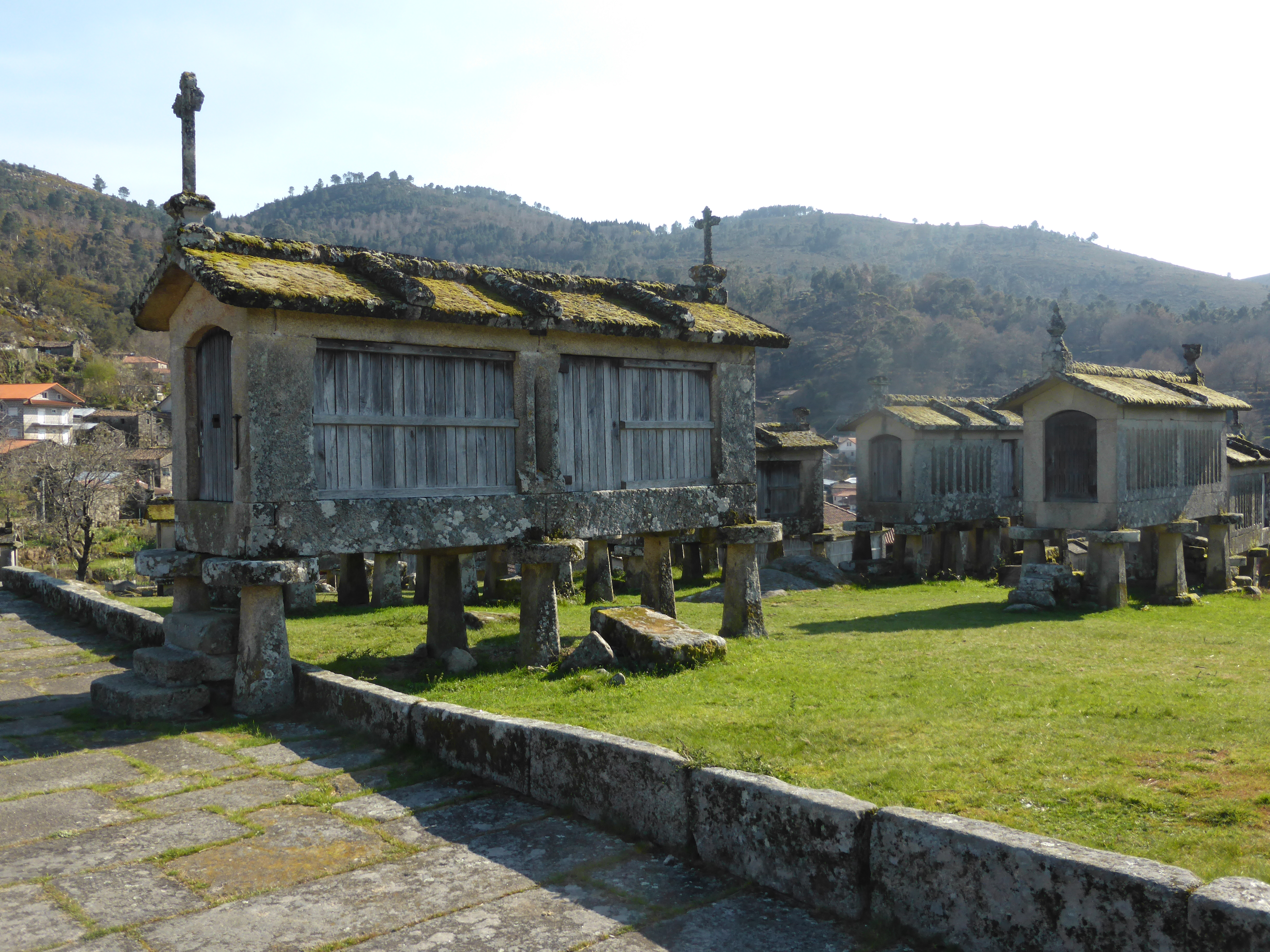 Espigueiros, for drying out grain